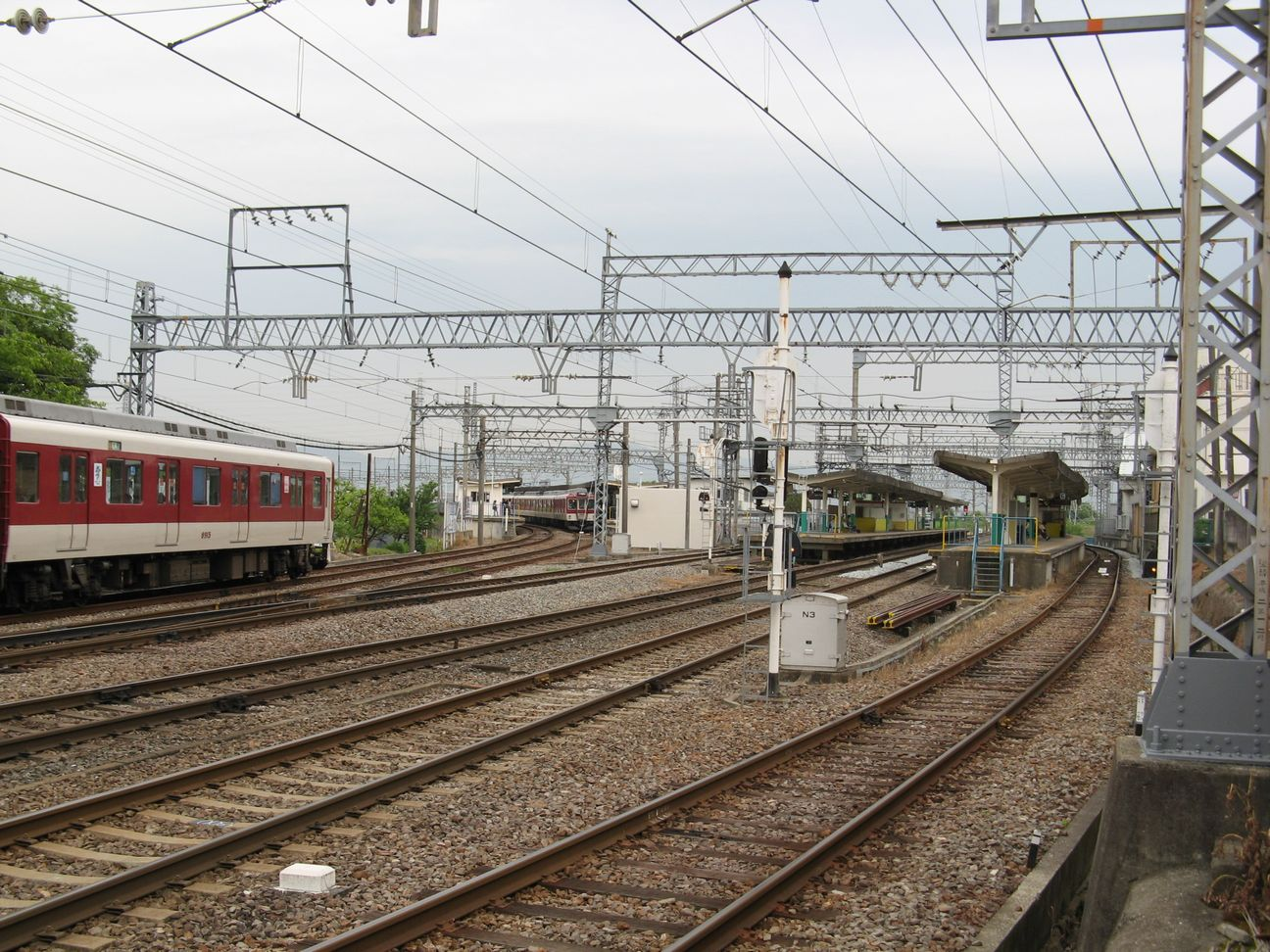 近鉄平端駅構内 手前2面4線が橿原線ホーム、奥の相対式ホームが天理線ホーム（天理行急行が進入中）